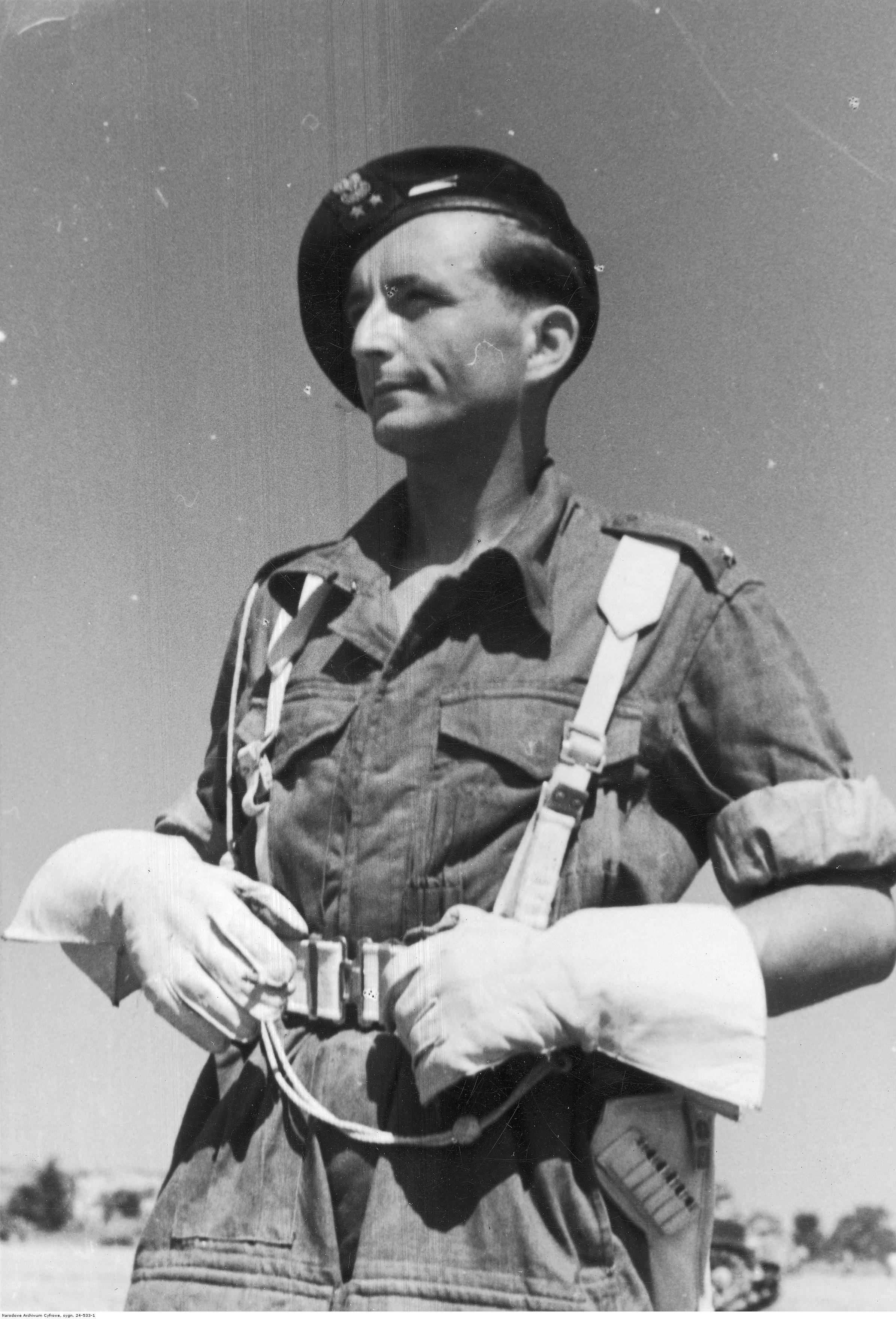 2 Warszawska Dywizja Pancerna - porucznik z 1 Pułku Ułanów Krechowieckich; 1945. Archiwum Fotograficzne Tadeusza Szumańskiego. Sygnatura: 24-533-1